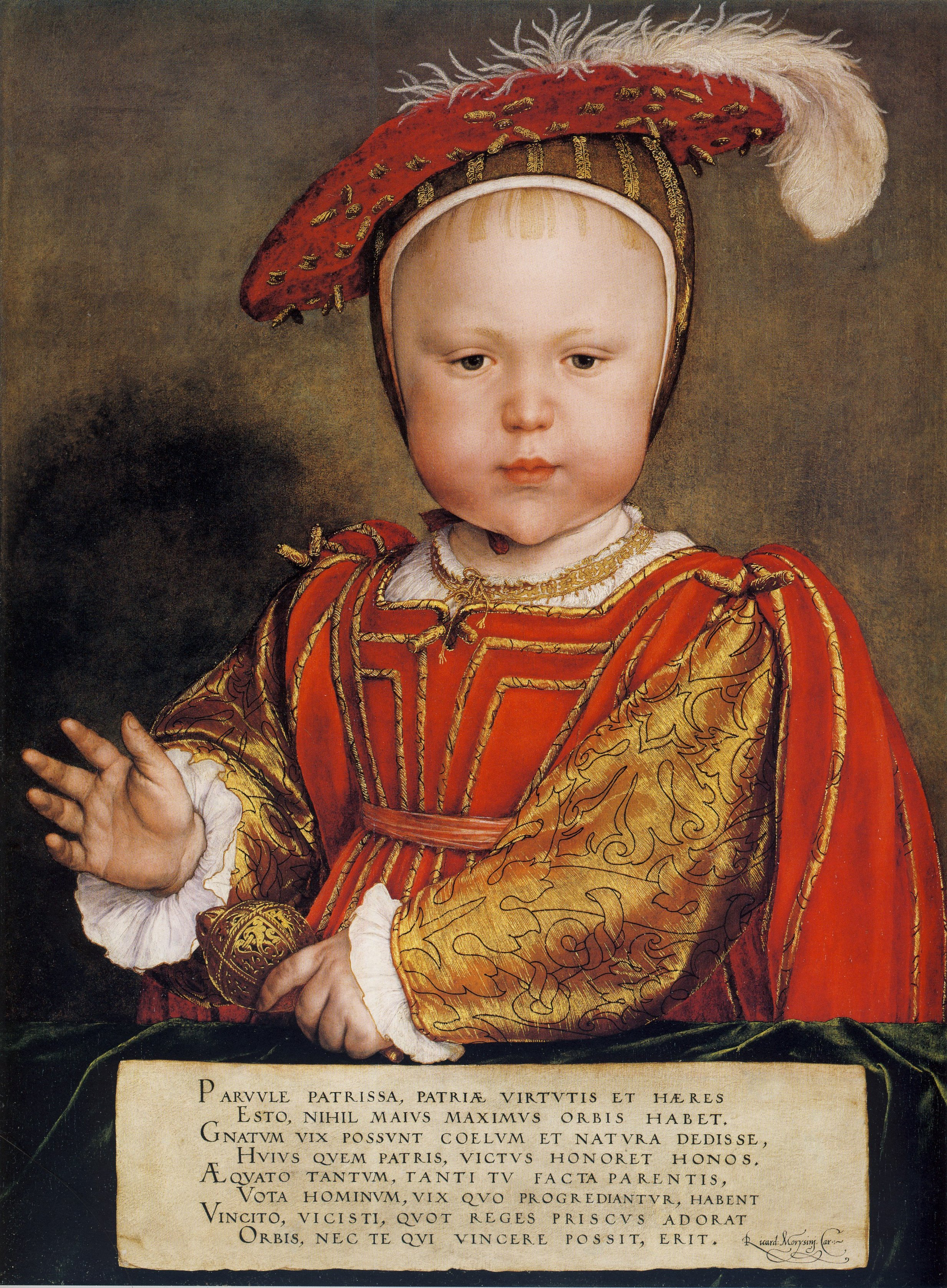 Edward Tudor, von 1547 bis zu seinem Tod 1553 als Edward VI. König von England und Irland, als Kleinkind; die rechte Hand zum Segensgruß erhoben, in der linken eine goldene Rassel, die einem Zepter gleicht.